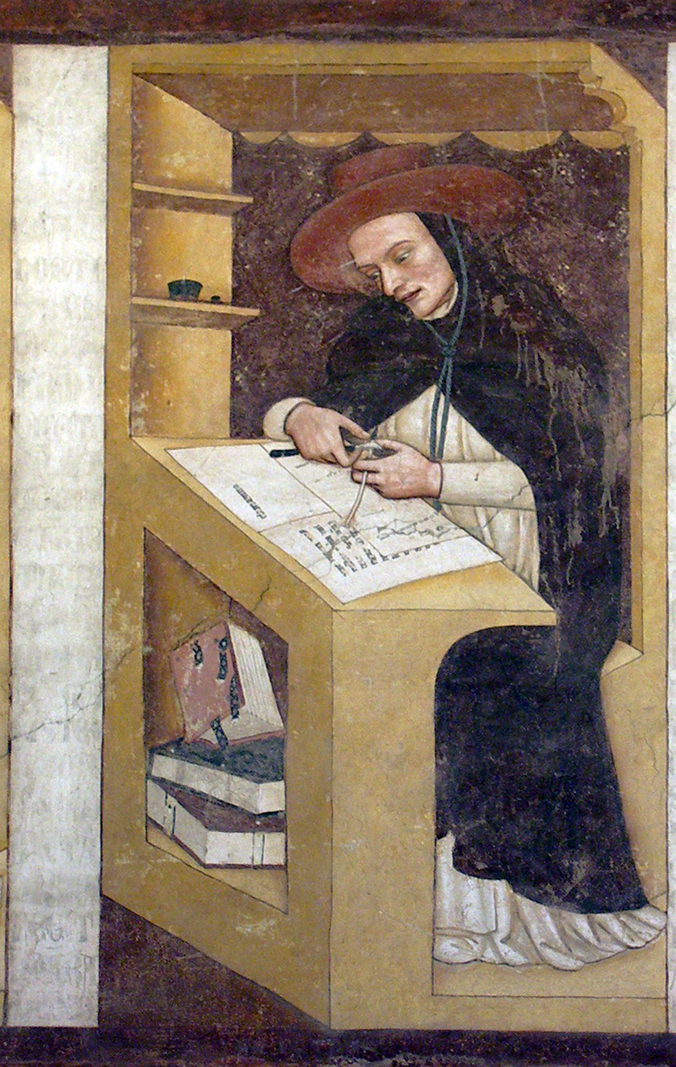 Pietro di Tarantasia, serie dei Quaranta domenicani illustri, ex convento di San Niccolò, Sala del Capitolo, Treviso, 1352 (altezza di ciascun ritratto 150 cm circa)